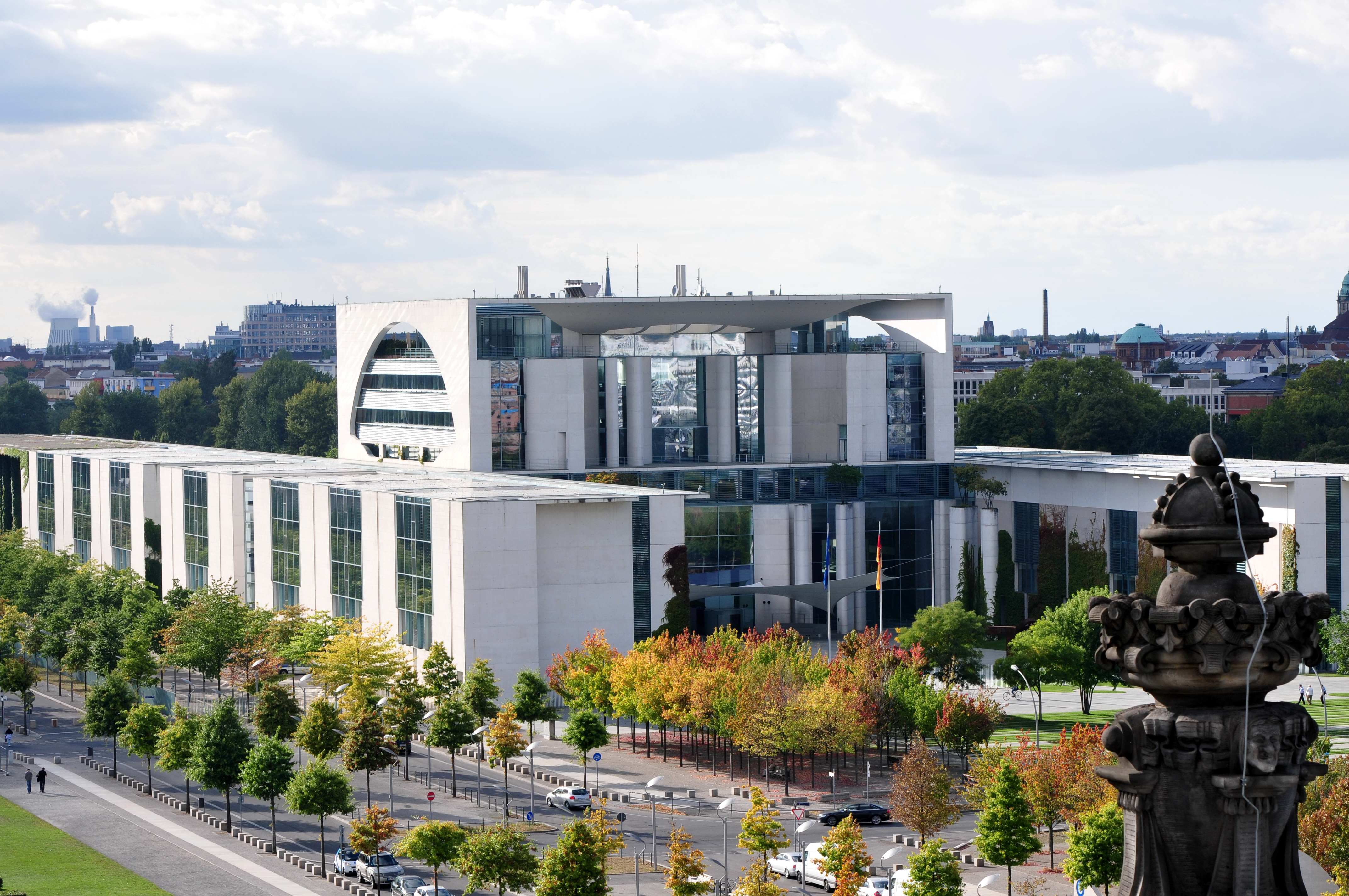 Bundestag The making of this document was supported by the Community-Budget of Wikimedia Germany. Wikipedia-Bundestagsprojekt 2014 8–12 September 2014 in BerlinThis file was taken during the project “Wiki loves parliaments/Bundestag 2014” (German). Organisation: Martin Rulsch, Olaf KosinskyDesign: Martin KraftPhotography: Foto-AG Gymnasium Melle (Jan-Kristof Blömke, Lukas Eismann, Moritz Kosinsky, Laura Lessing, Karsten Mosebach, Mascha Mosebach, Teresa Schreer, Noah Sewöster, Niklas Tschöpe), Olaf Kosinsky, Martin Kraft, Harald Krichel, Steffen Prößdorf, Ralf Roletschek, Martin Rulsch, Gerd Seidel, Sven TeschkeVideo: Marc Rudnick, Manuel SchneiderEditors: Marcus Cyron, Günter Fremuth, Martin Kraft, Robin Krahl, Harald Krichel, Martin Rulsch, WikiAnikaReception: DasMonstaaa, Leonie Rabea Große, Lutheraner, Nina Möllering, Martin Rulsch, WikiAnika, Foto-AG Gymnasium MelleCosmetics: Regina Bosak, Bettina Dieguez, Sandra Kobbe, Andrea Strehlke; Irada Abdullayeva, Vivien Abelmann, Olena Engelbrecht, Sarah Fabini, Nina Magnus, Jacqueline Schmidt, Leonie Taboada, Julia Willer Usage information If you need more information how to use this file, please send an email to .